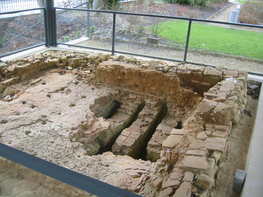 De réimeschen Zillenuewen haut am Park vun der Maison Risch zu Capellen. Kategorie:Gemeng Mamer Capellen